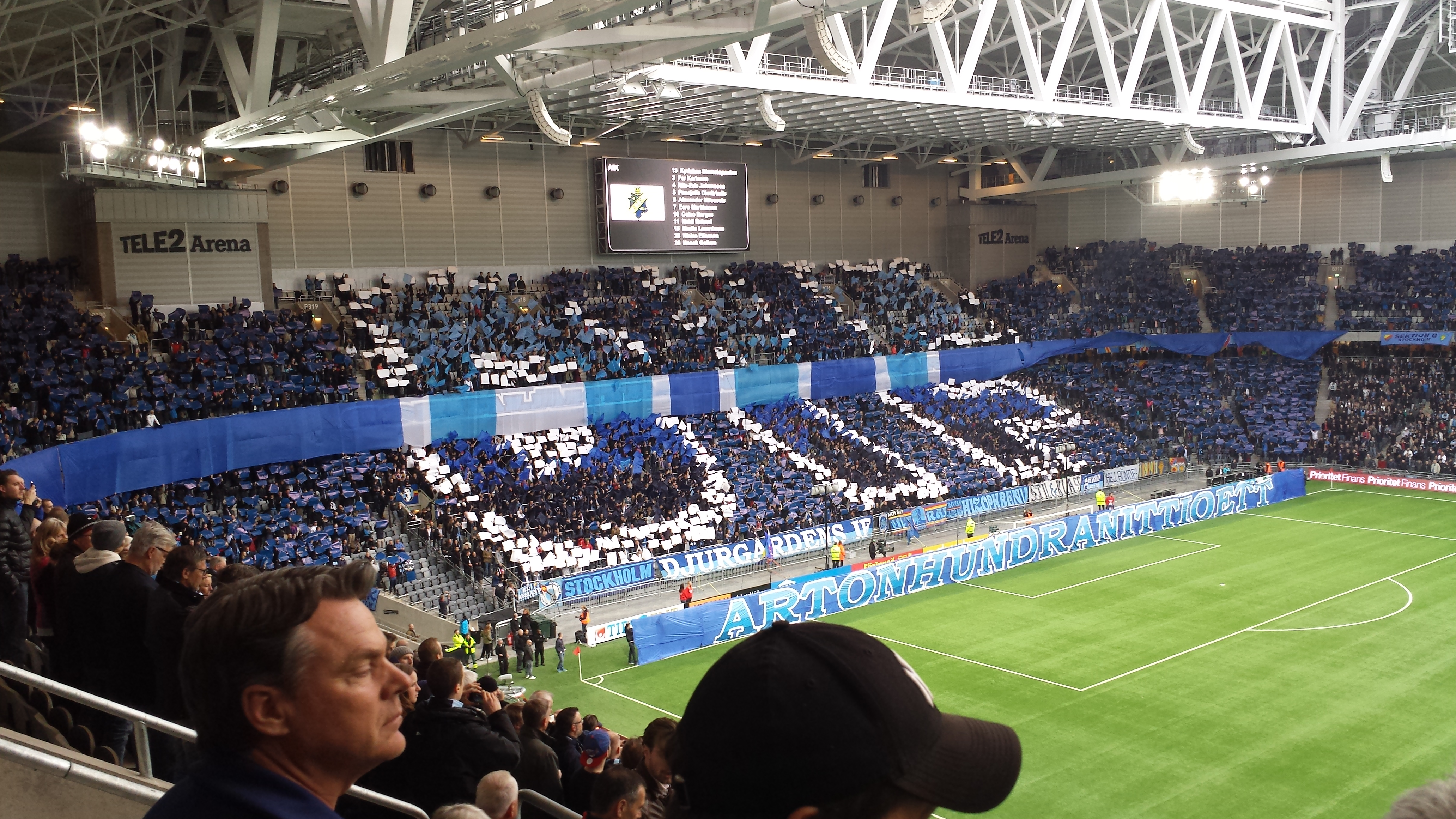 Djurgårdens IF - AIK, Tele 2 Arena, 16 april 2014